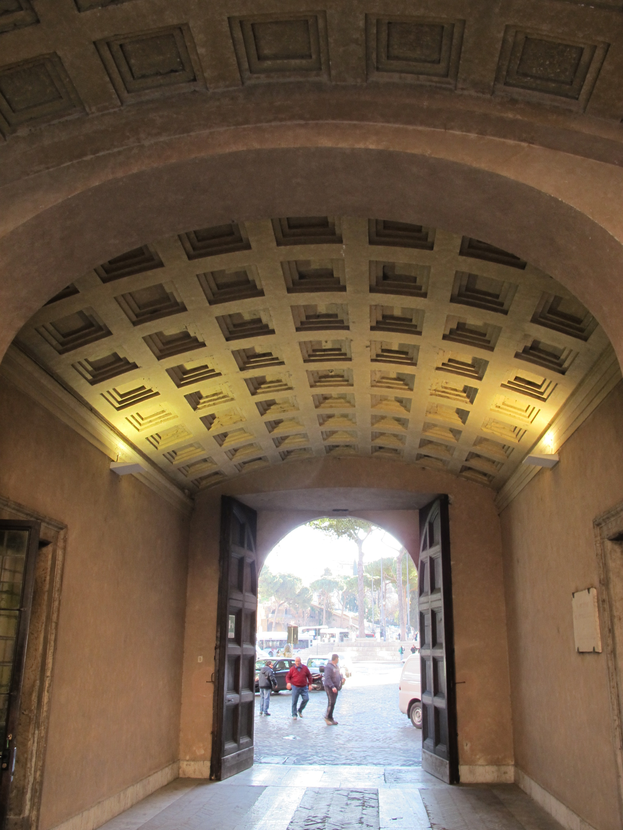 Palazzo venezia, volta in calcestruzzo quattrocentesca